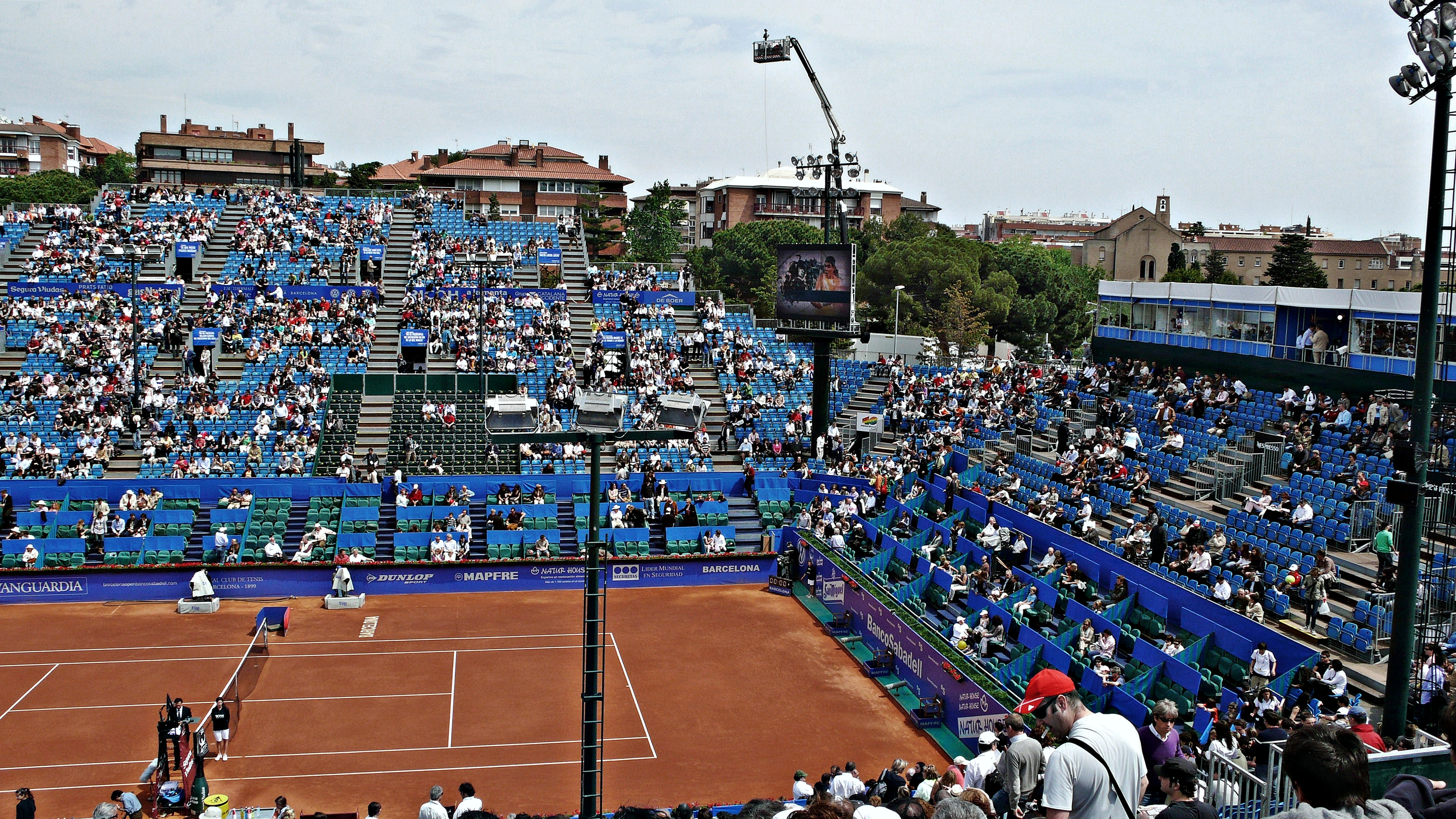 pista central del barcelona open